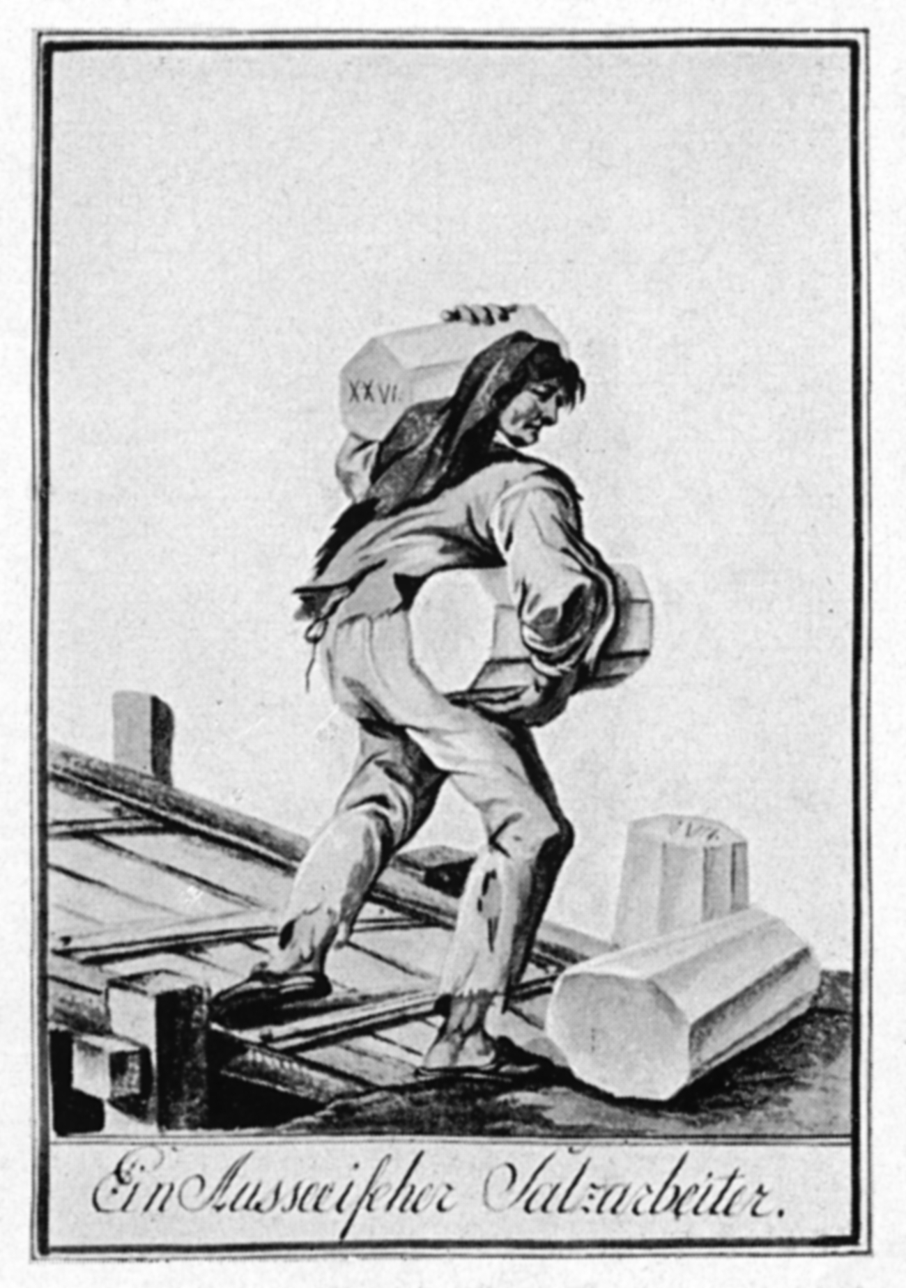 Steirisches Trachtenbuch - Mautner-Geramb 1935 Traditional Costumes from Ennstal, Styria